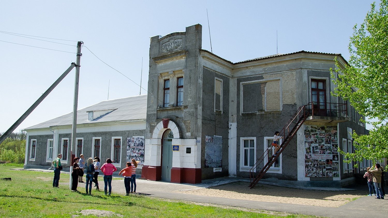 Садибний будинок Скаржинського, Вознесенський район, Село Трикрати